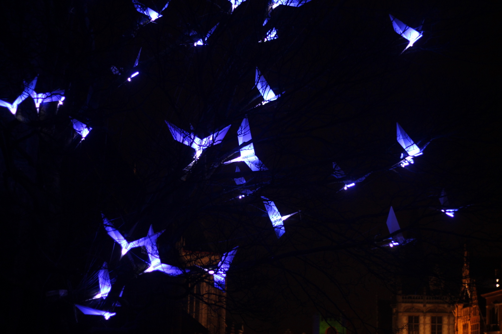 20120128 Gent Verlicht